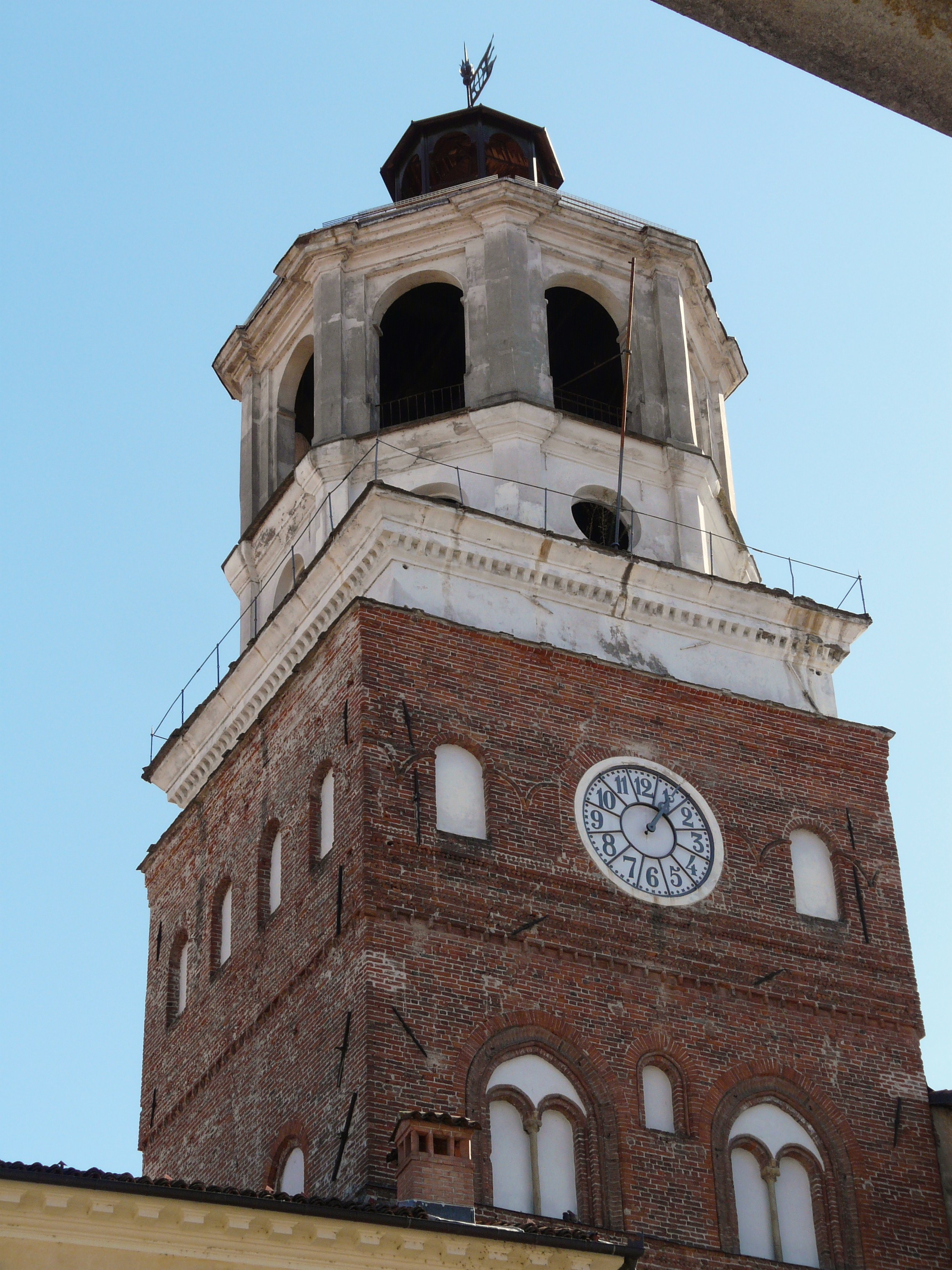 Torre civica di Savigliano, Piemonte, Italia